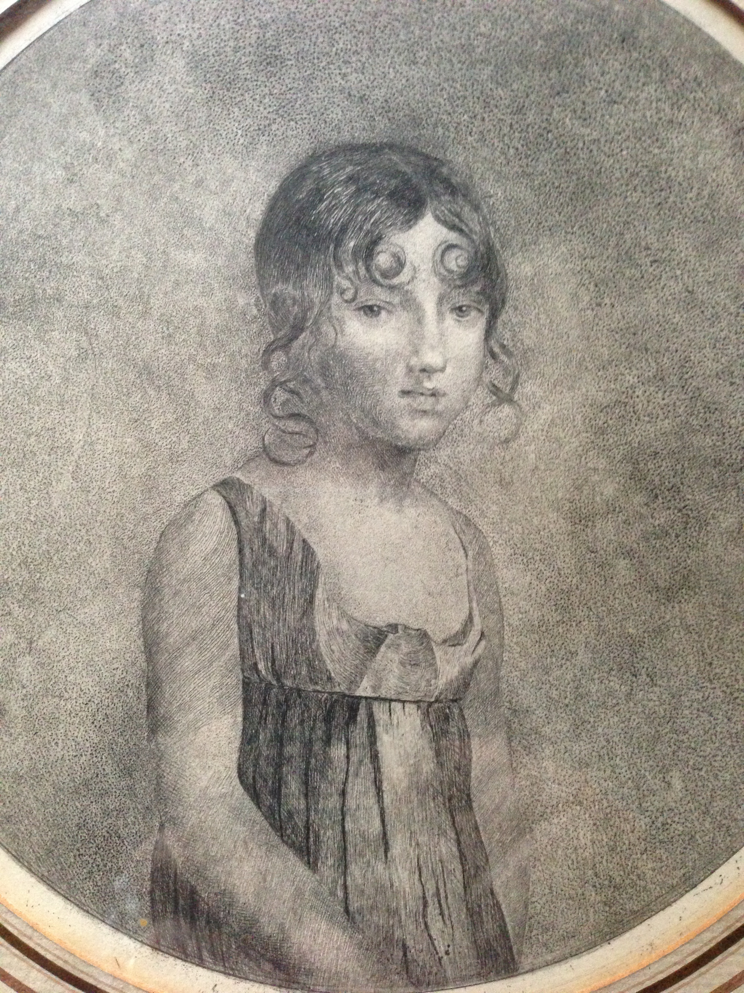 Crayon de Laure de Comère dans sa Jeunesse - Coll. Particulière